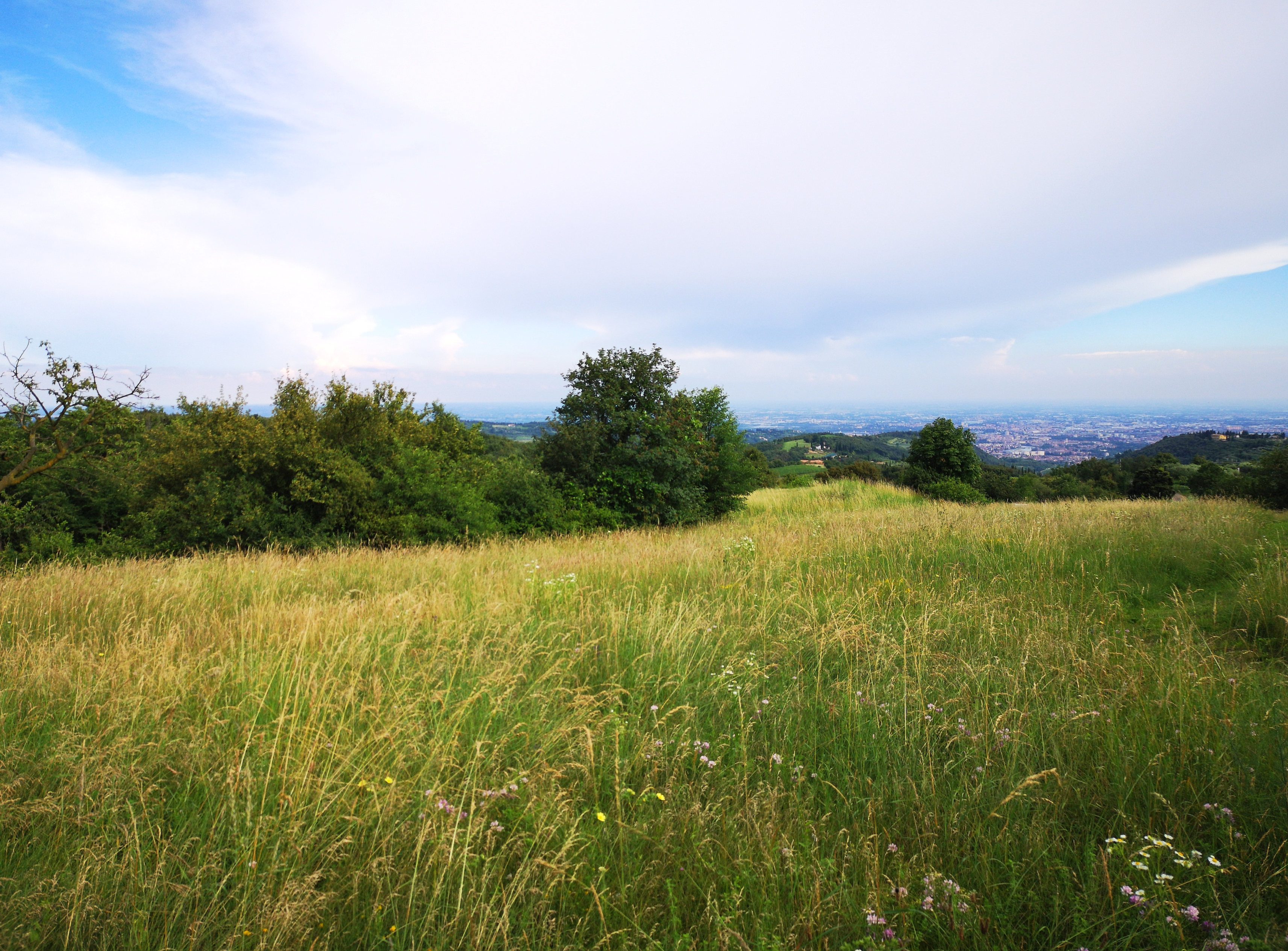 Val Galina e Progno Borago (Q55719889)